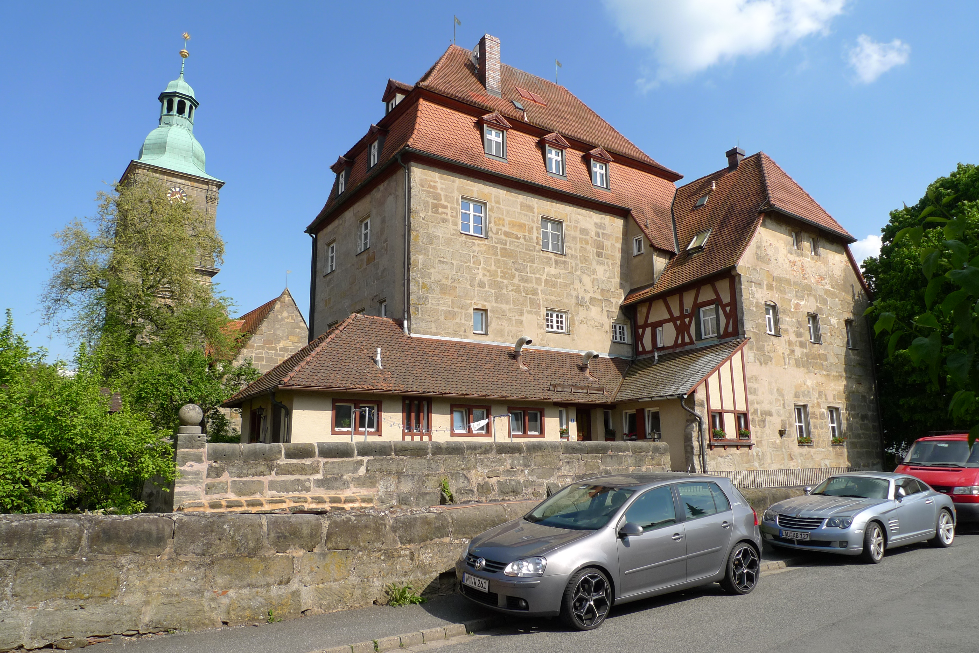 Westansicht des Kalchreuther SchlossesThis is a photograph of an architectural monument.